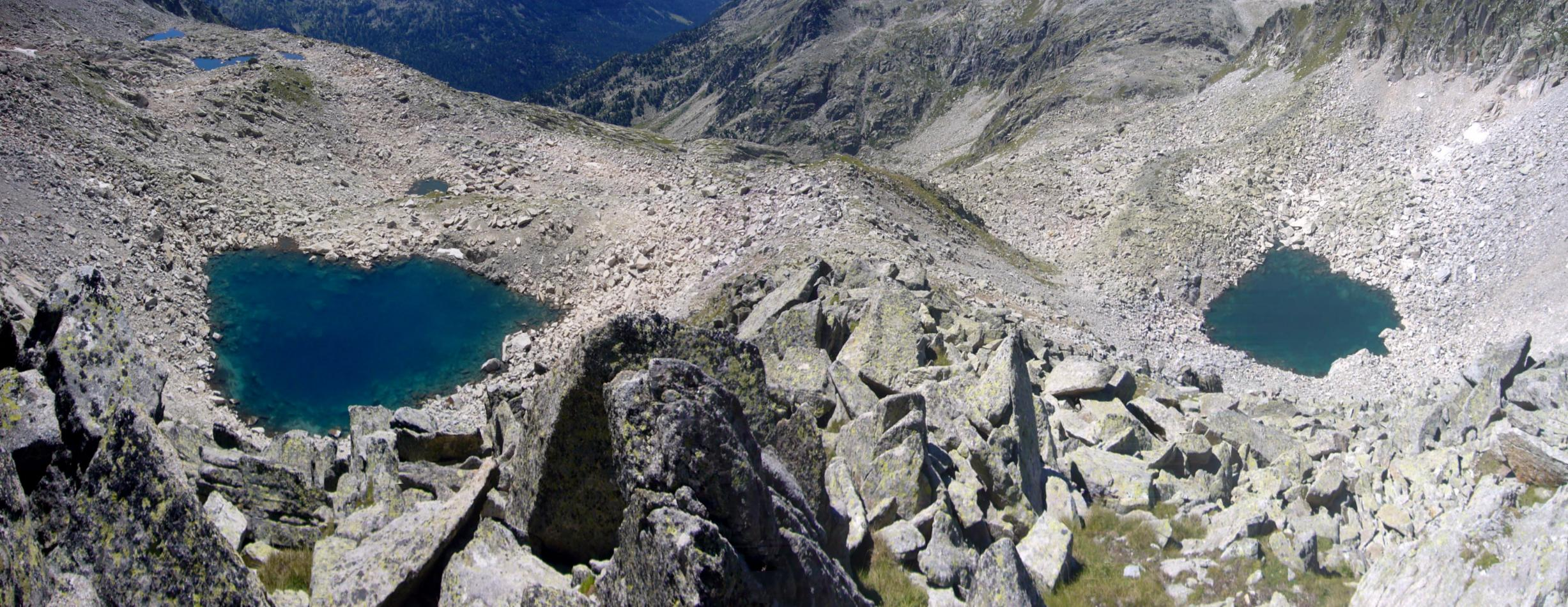 Estanys Gelat de Contraix vistos des de la carena entre el Pic Oriental i el Tuc Blanc; la Vall de Boí, Alta Ribagorça, Catalunya